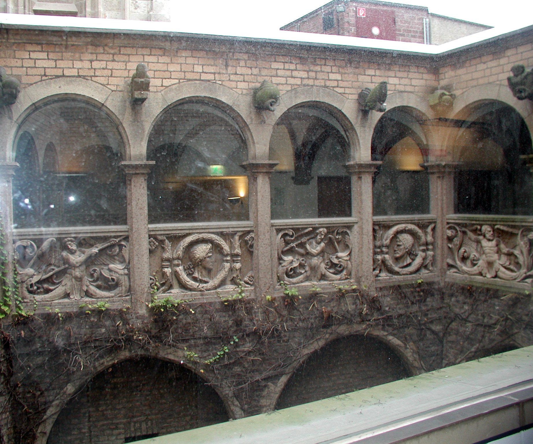 Köln-Rathaus, Rundgang Löwenhof